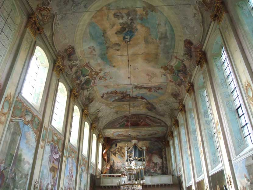 fresco's van J.A. Schöpf in de Gerlachuskèrk in Houthem - Sint Gerlach